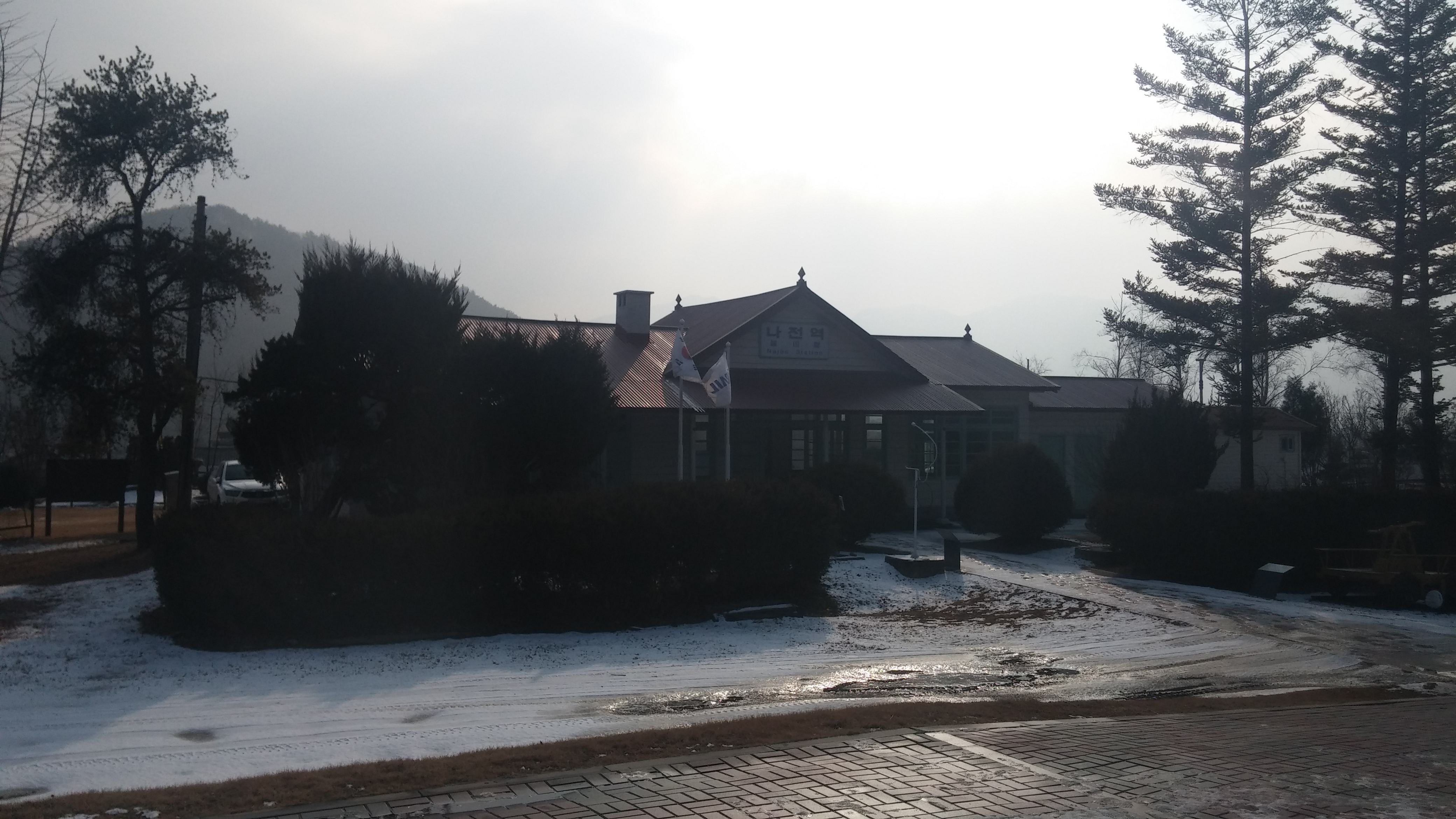 한국철도공사 민둥산역 역사(선로측).